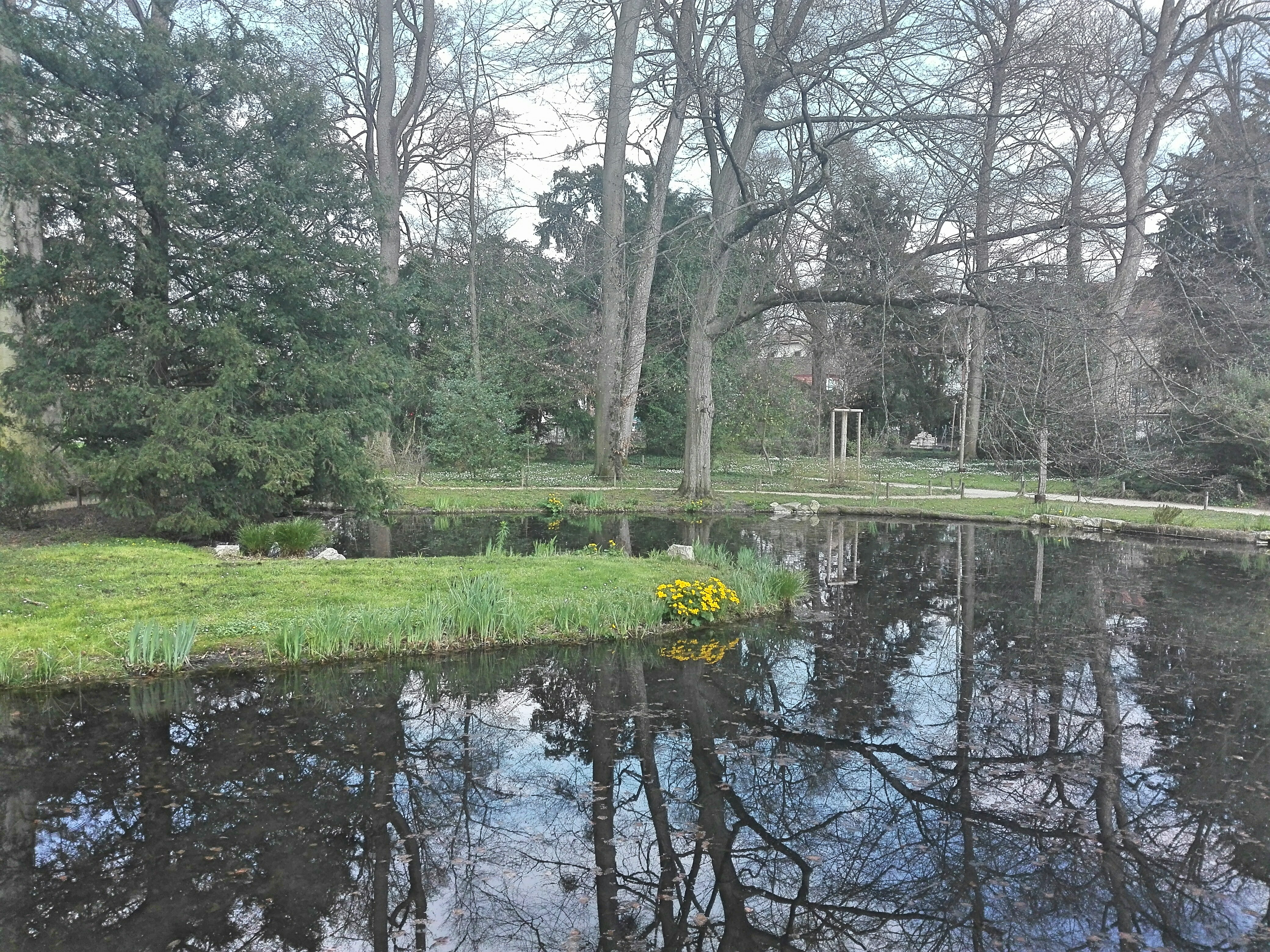 Sarasinpark in Riehen bei Basel Englischer Garten